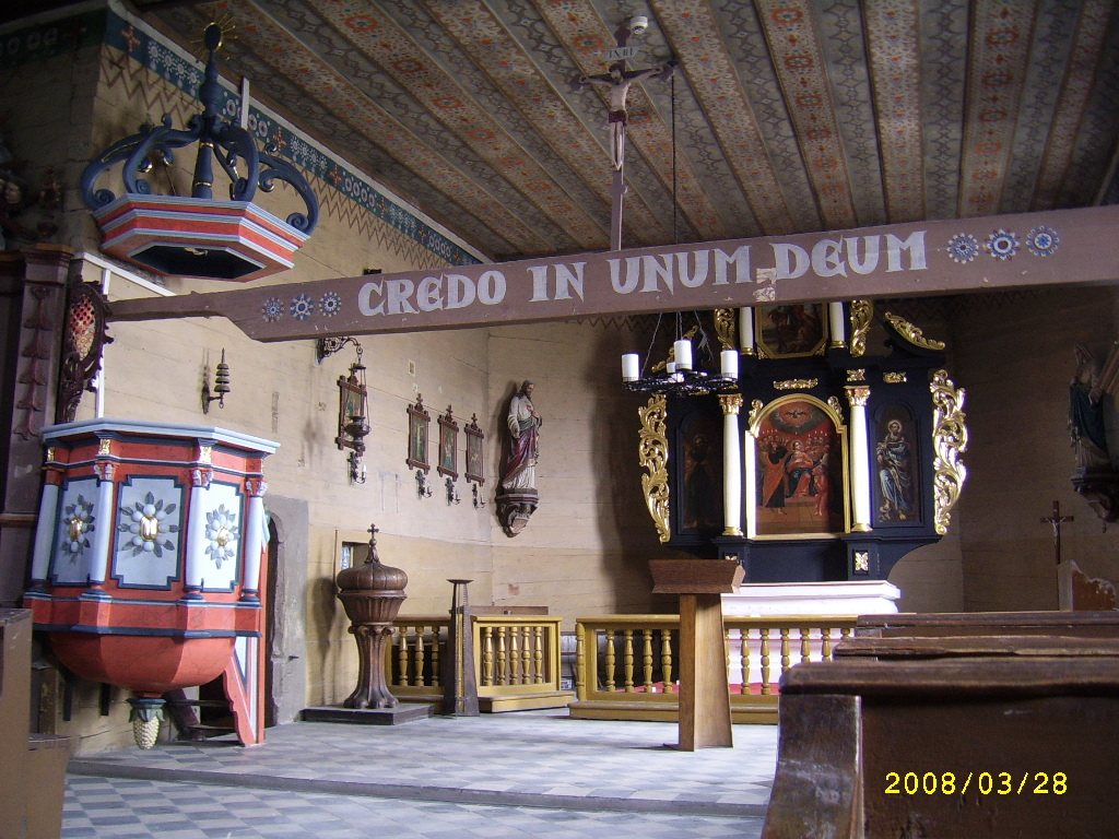 Kościół Wszystkich Świętych w Bojszowie - wnętrze.